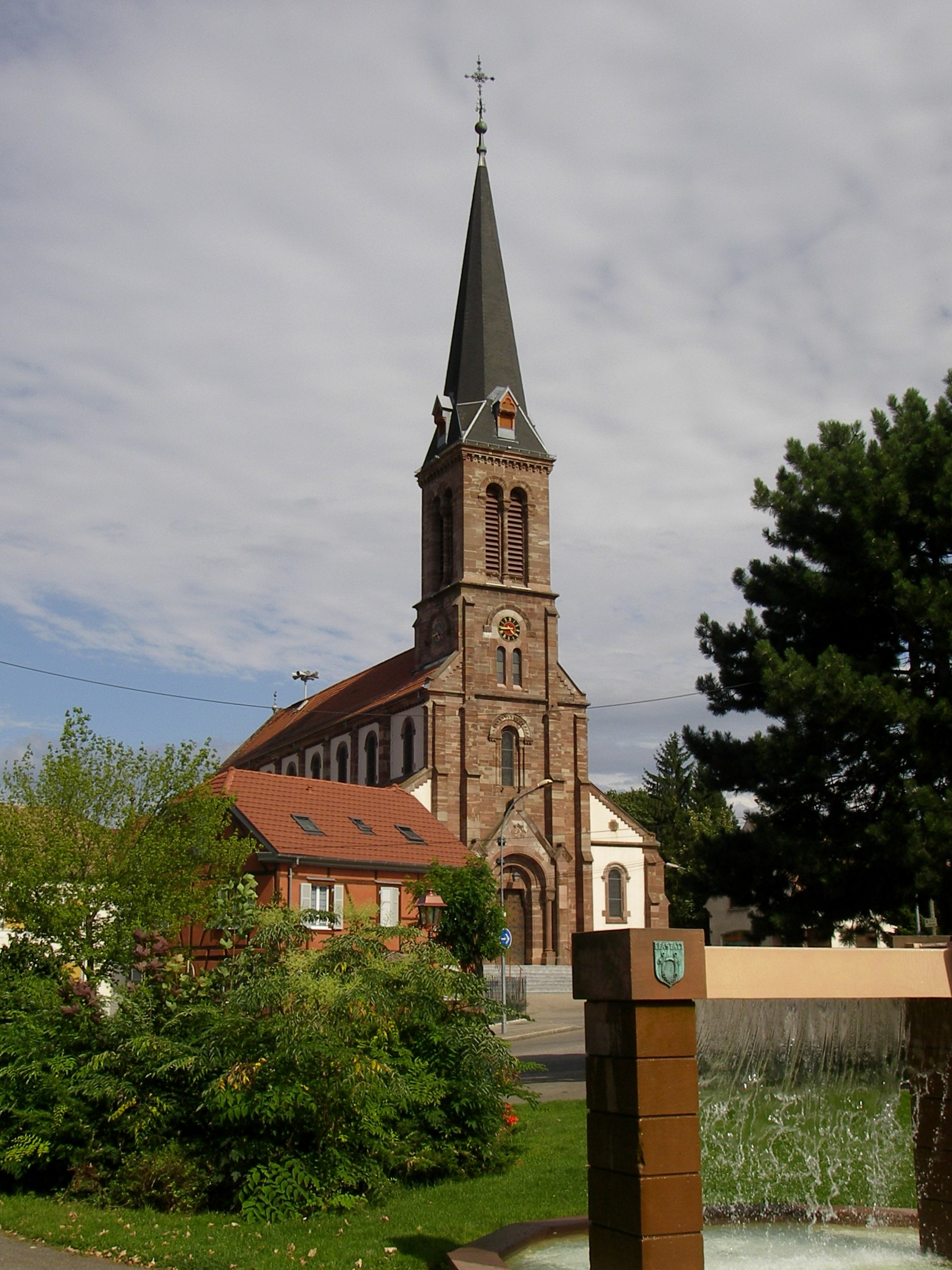 Eglise de Pfastatt (Haut-Rhin, France)